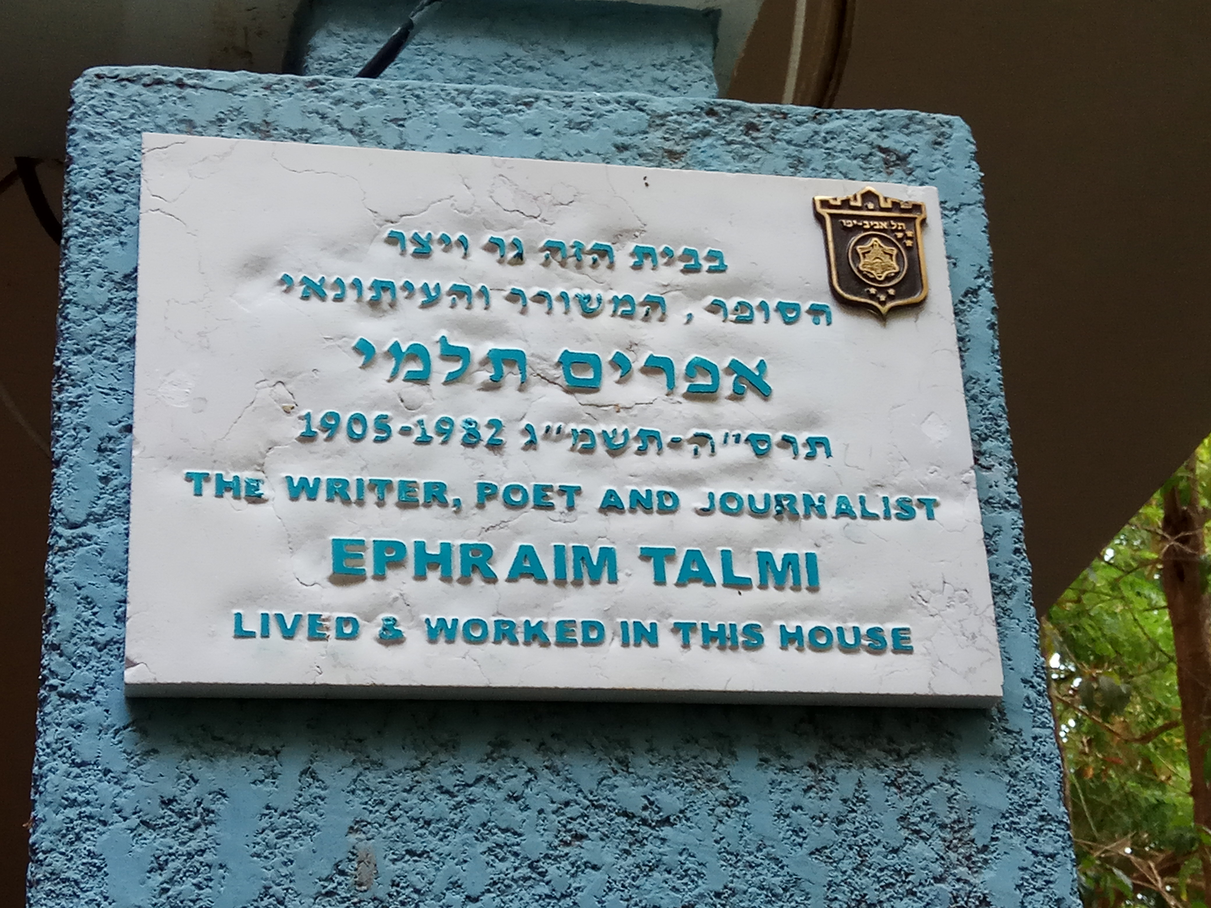 לוחית זיכרון לאפרים תלמי ברחוב אלכסנדר ינאי 9 בתל אביב